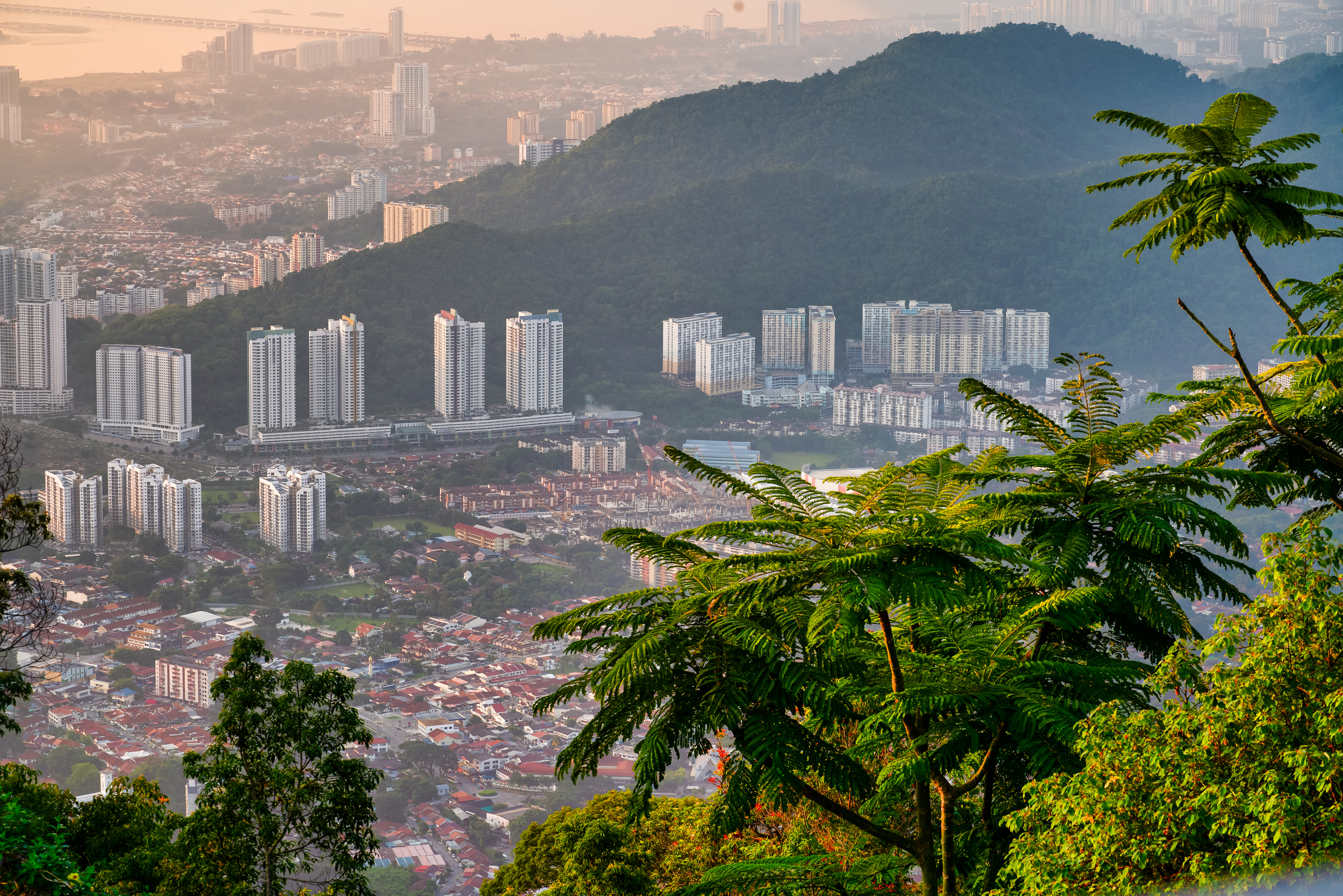 Contax CZ 100-300mm